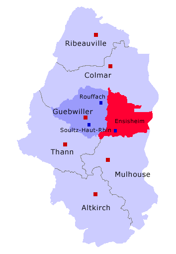 Lage von Kanton Ensisheim im Arrondissement Guebwiller und im Département Haut-Rhin